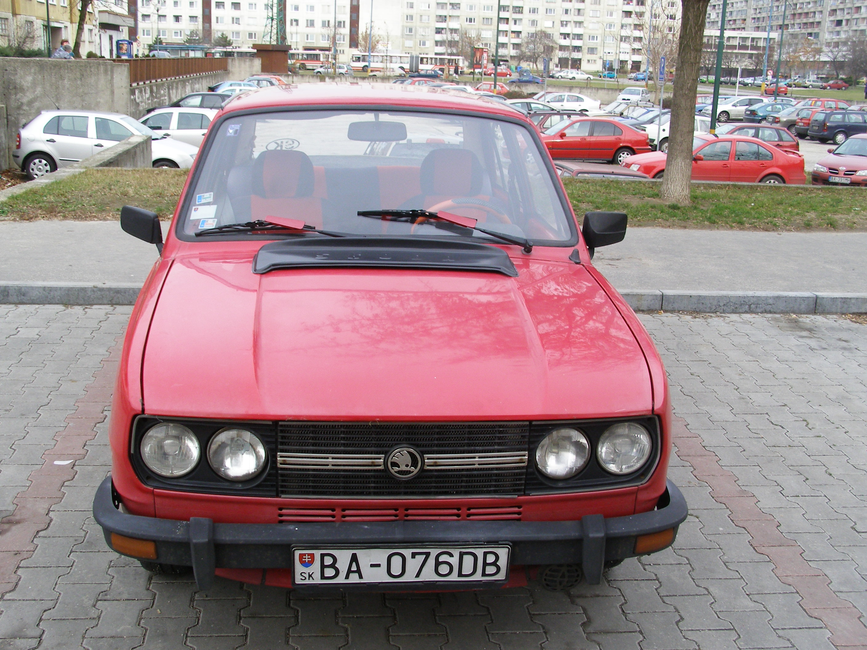 Škoda 120 LS, Bratislava